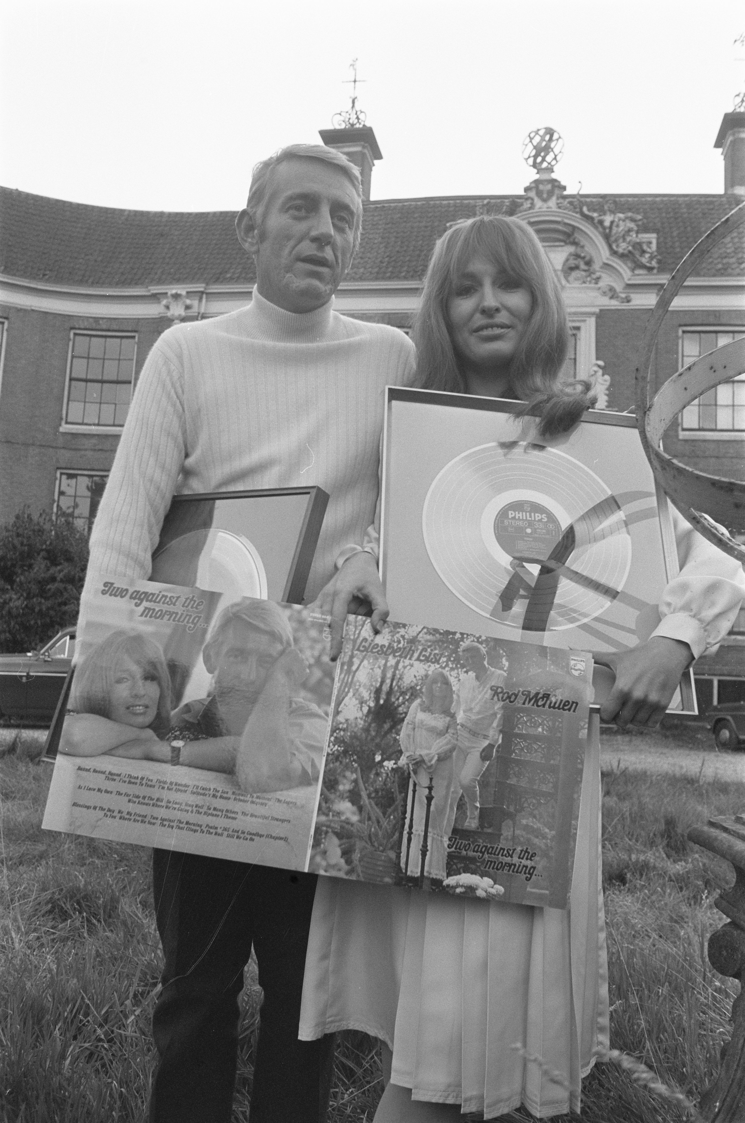 Collectie / Archief : Fotocollectie Anefo Reportage / Serie : [ onbekend ] Beschrijving : Liesbeth List en Rod McKuen presenteren LP Two against the morning in Kasteel Groeneveld te Baarn Datum : 25 september 1972 Locatie : Baarn Persoonsnaam : Groeneveld Kasteel, List, Liesbeth Fotograaf : Verhoeff, Bert / Anefo Auteursrechthebbende : Nationaal Archief Materiaalsoort : Negatief (zwart/wit) Nummer archiefinventaris : bekijk toegang 2.24.01.05 Bestanddeelnummer : 925-9061